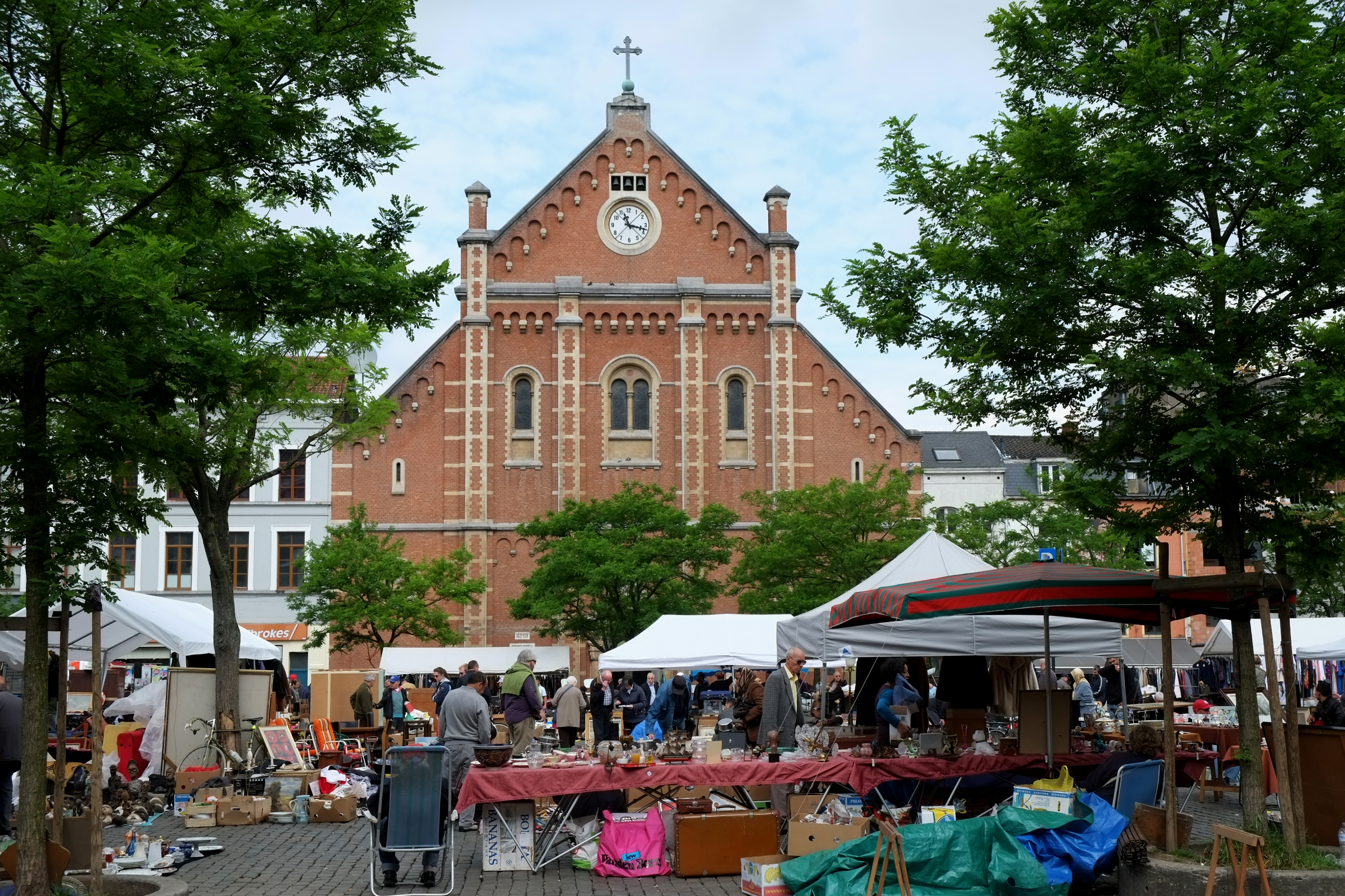 Marché aux puces place du Jeu de Balle dans le quartier des Marolles Bruxelles